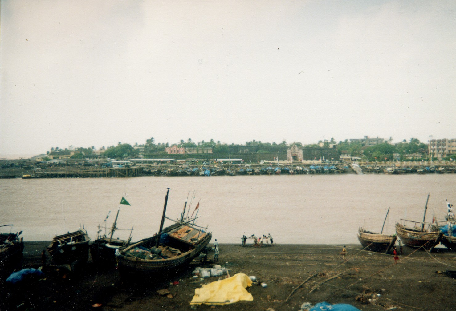 Daman - Daman Ganga River and Nani Daman Fort